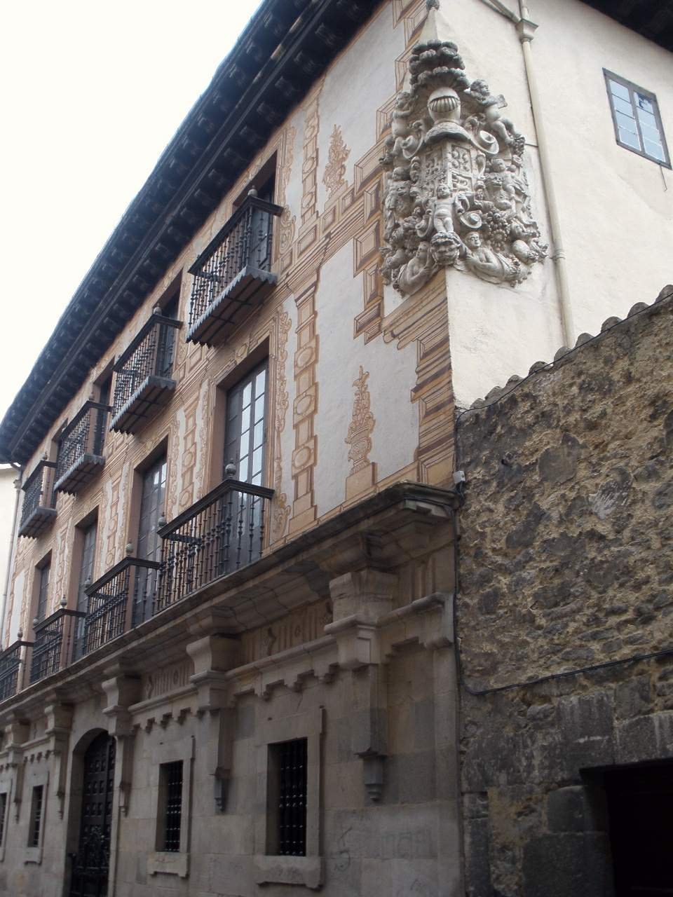 Vitoria - Calle Herrería